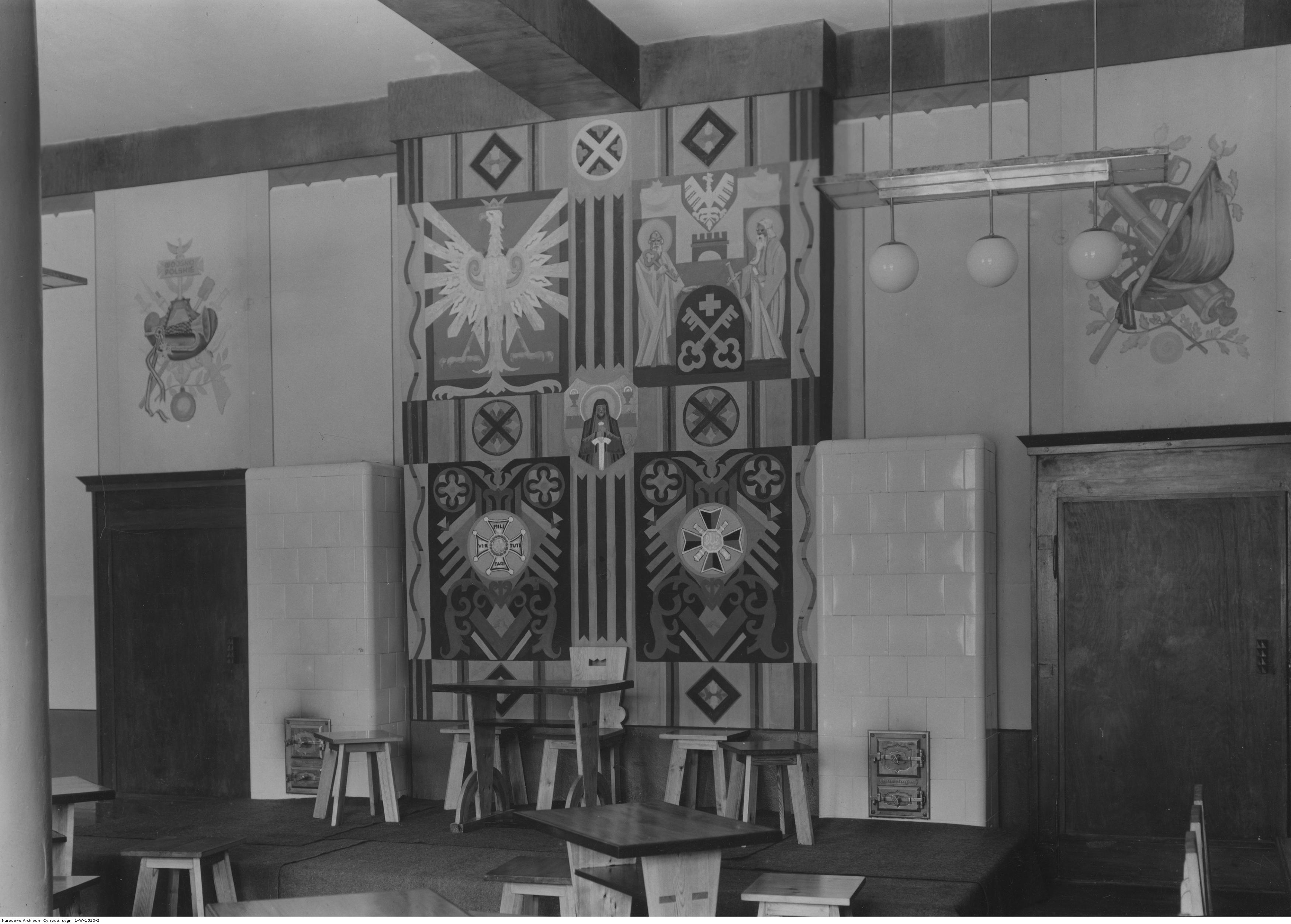 Świetlica żołnierska im. Marszałka Józefa Piłsudskiego w koszarach 14 Pułku Artylerii Lekkiej Wielkopolskiej z Poznania. Widok wewnętrzny świetlicy z herbami Polski, Poznania oraz reprodukcjami orderu Virtuti Militari nadanego pułkowi w roku 1920 i odznaki pułkowej. Koncern Ilustrowany Kurier Codzienny - Archiwum Ilustracji. Sygnatura: 1-W-1513-2